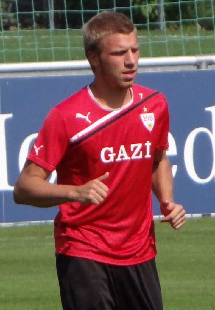 aufgenommen beim VfB-Training von